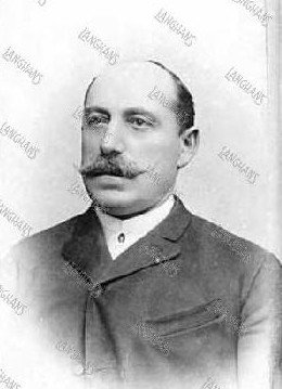 Hodys Josef, rakouský a český politik